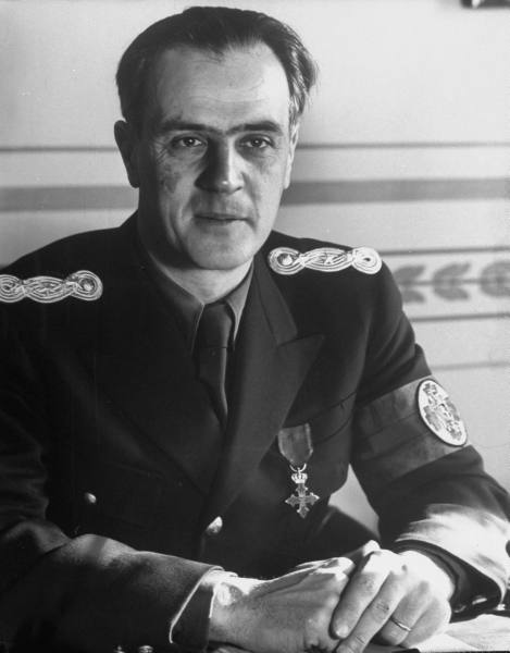 Ministrul Afacerilor Externe Grigore Gafencu (1939-1940)